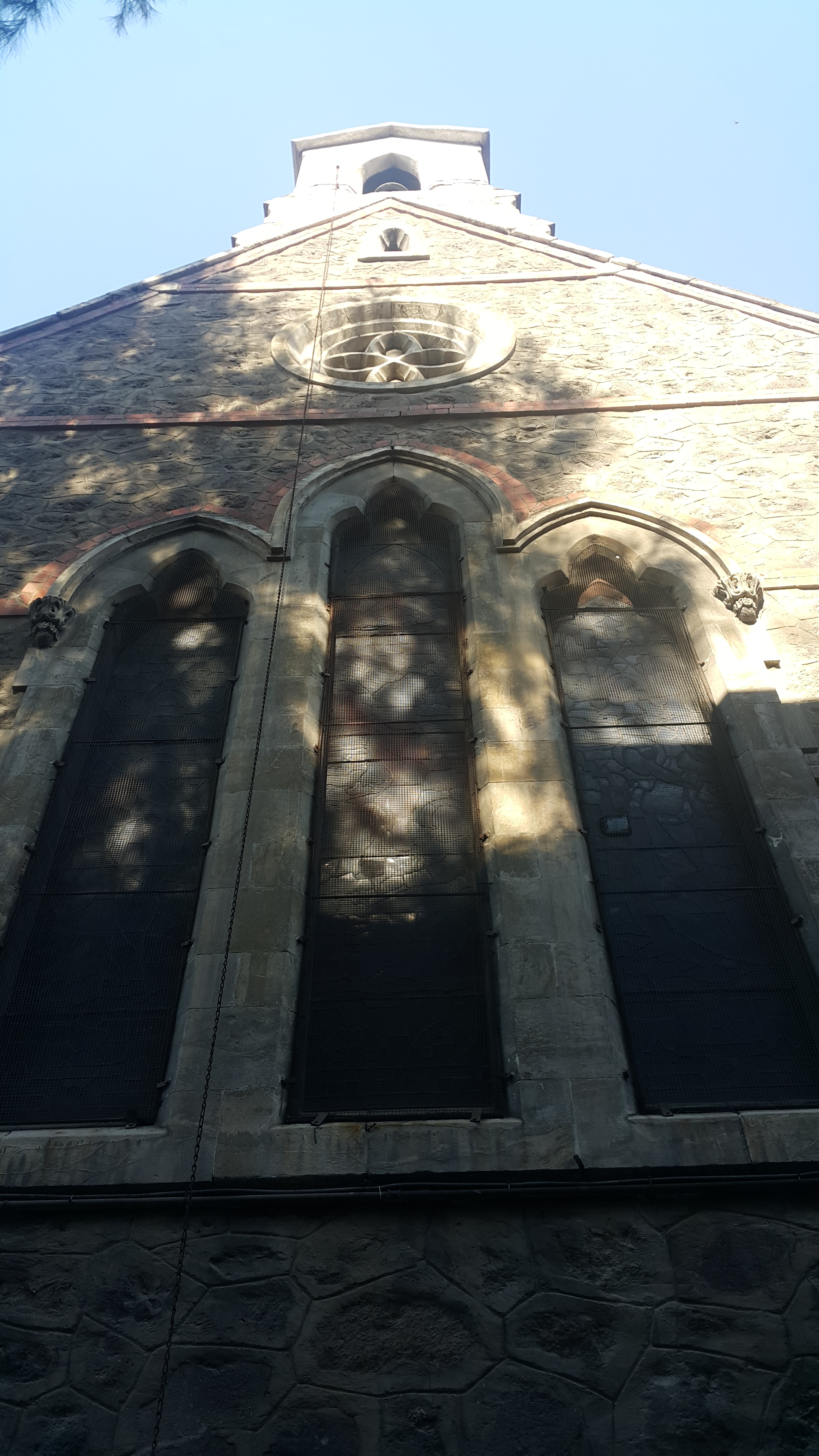 St. John the Evangelist's Anglican Rose Window